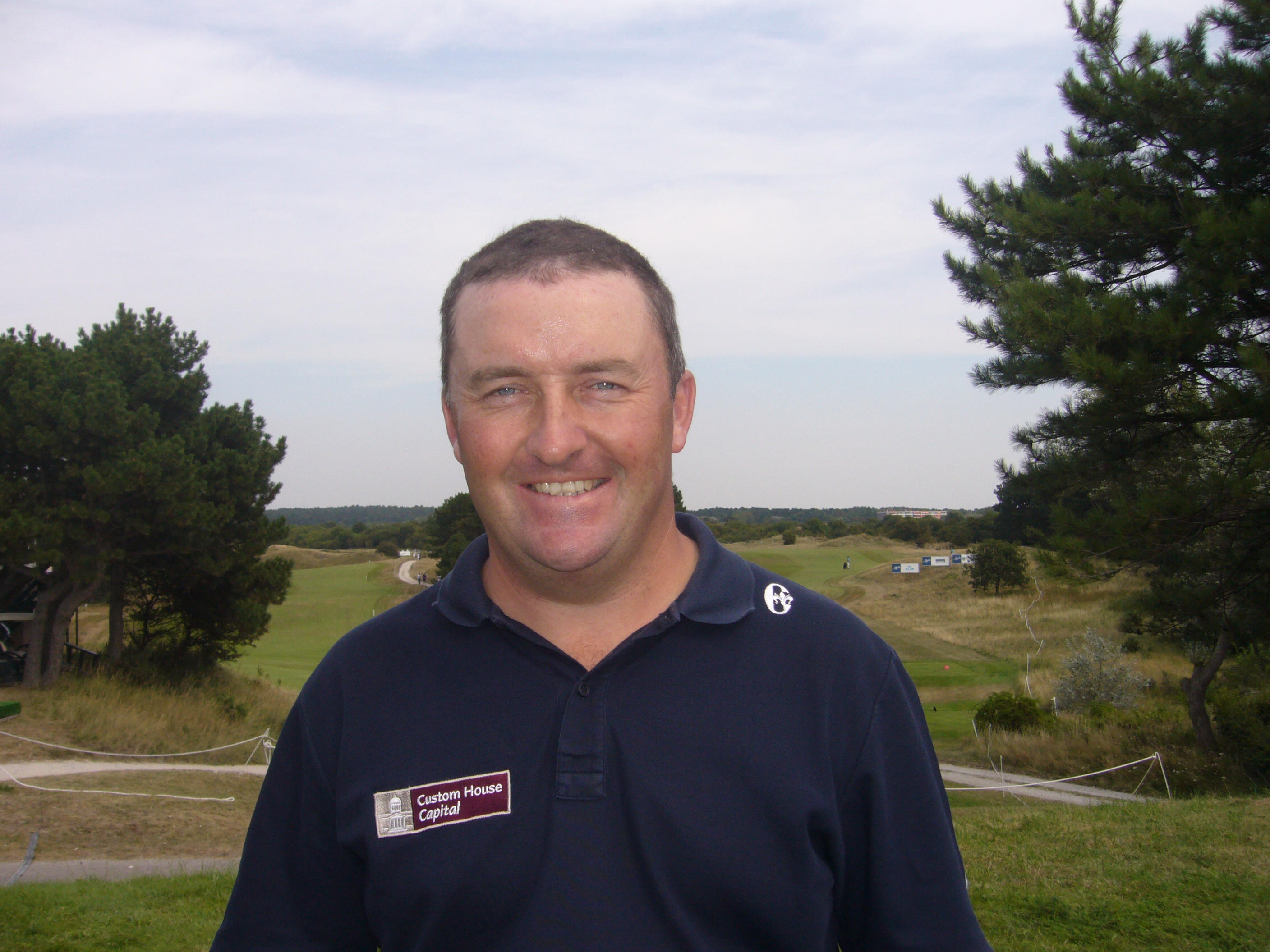 Damian McGrane op KLM Open 2009